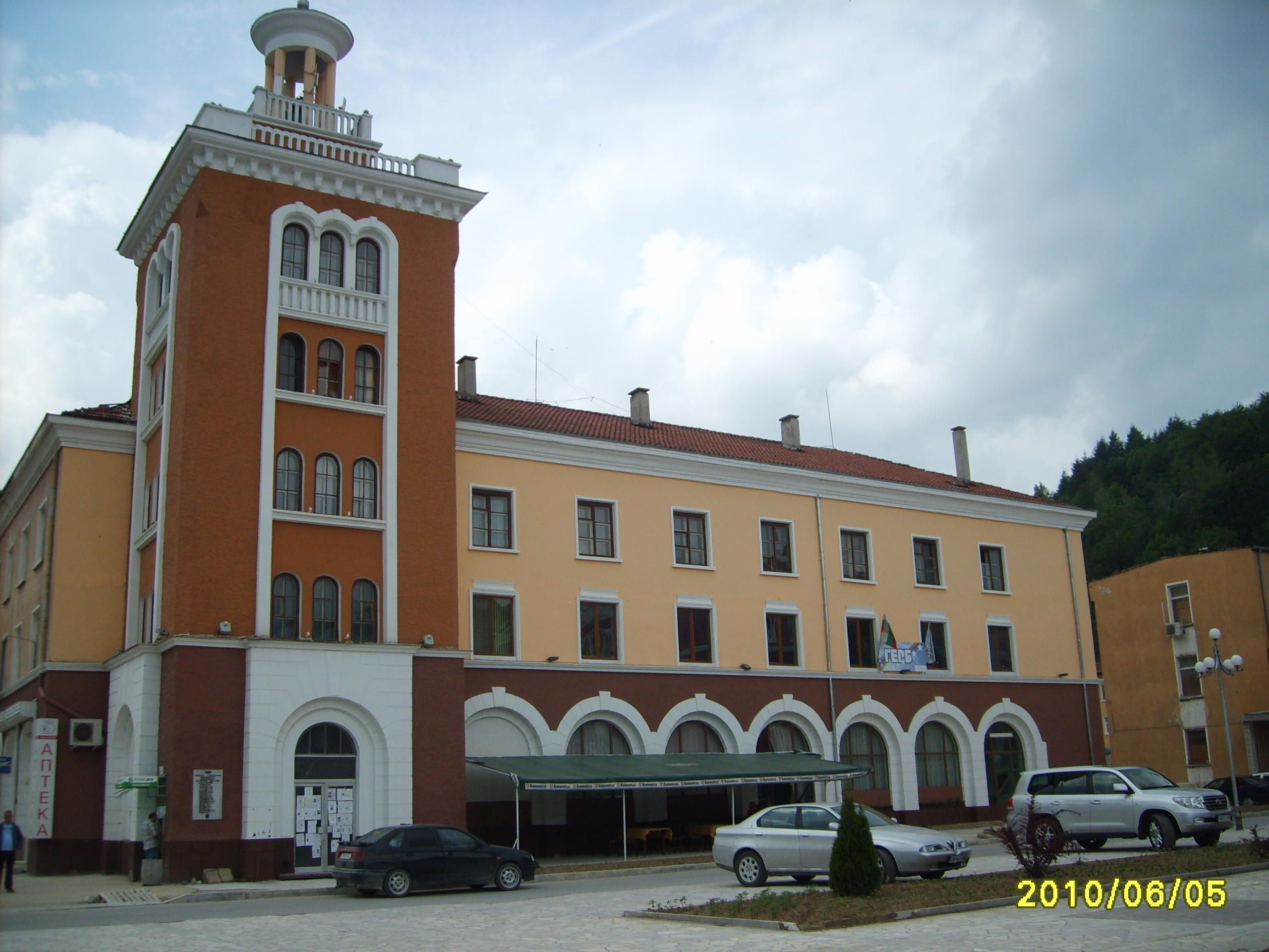 Рудоуправлението в Рудозем.